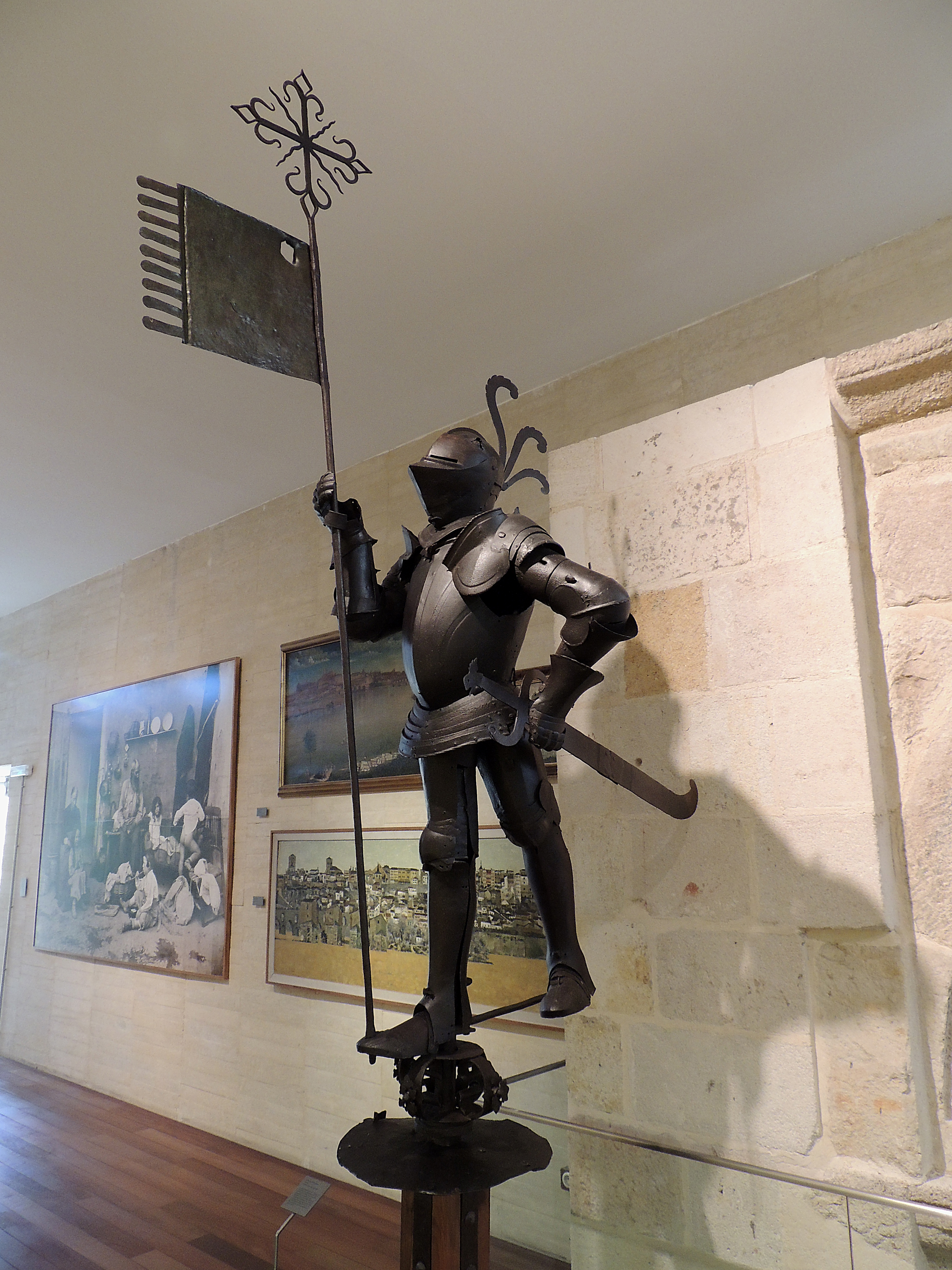 Veleta de "El Peromato" (primera mitad del s. XVI)